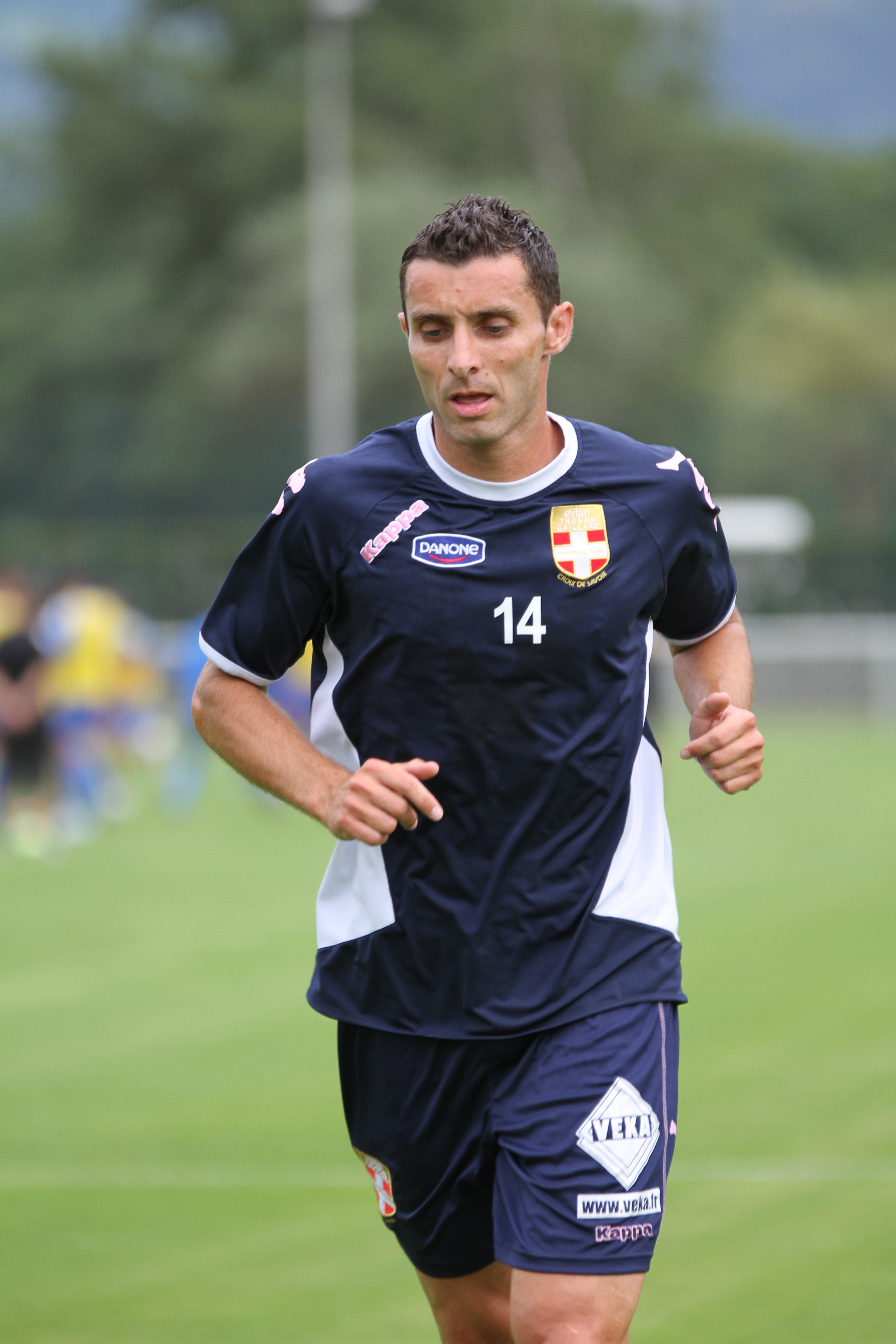 Cédric Barbosa lors du match SC Bastia-eTG le 12 juillet 2011